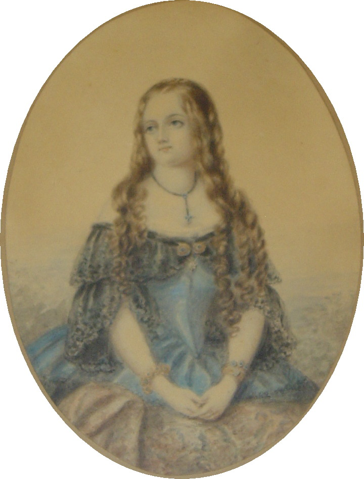 portrait au crayon coloré de Lady OGLE, jeune Anglaise demeurant à Bruxelles, fait à Waterloo, Bruxelles, en 1856, dimensions de l'ovale: (cm. 18,5 x 25,5)